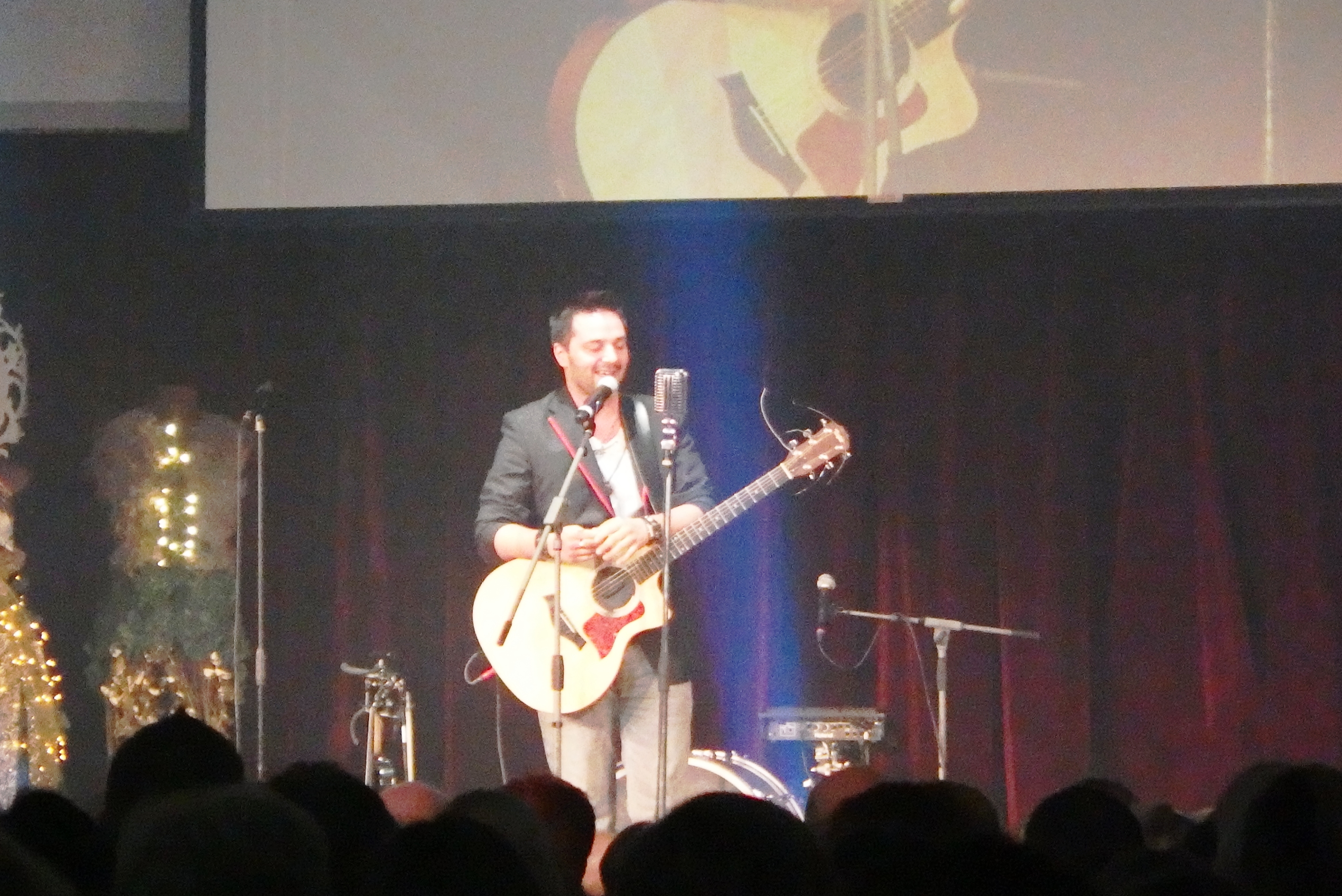 Peter Bažík, slovenský spevák.